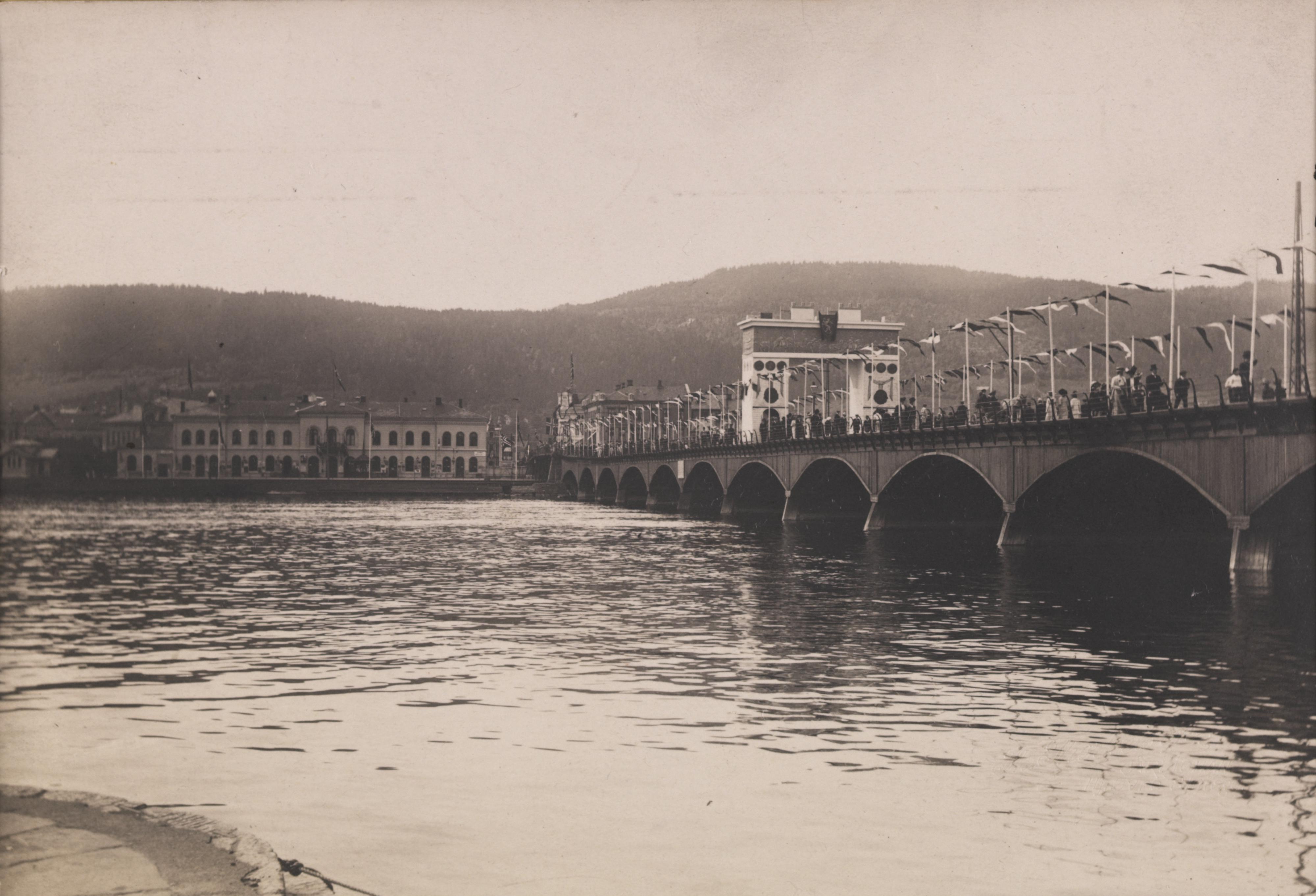 Drammens bybro. Fra hundreaarsfesten i Drammen. Bildet er hentet fra Nasjonalbibliotekets bildesamling. Anmerkninger til bildet var: Tittel hentet fra påskrift på komponentnr 1